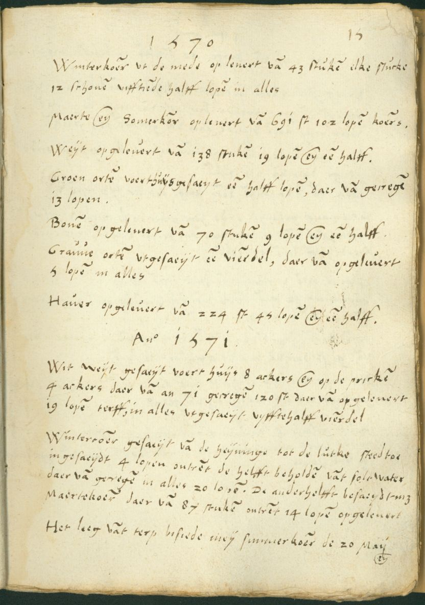 In side út it rekkenboek fan Rienck Hemmema